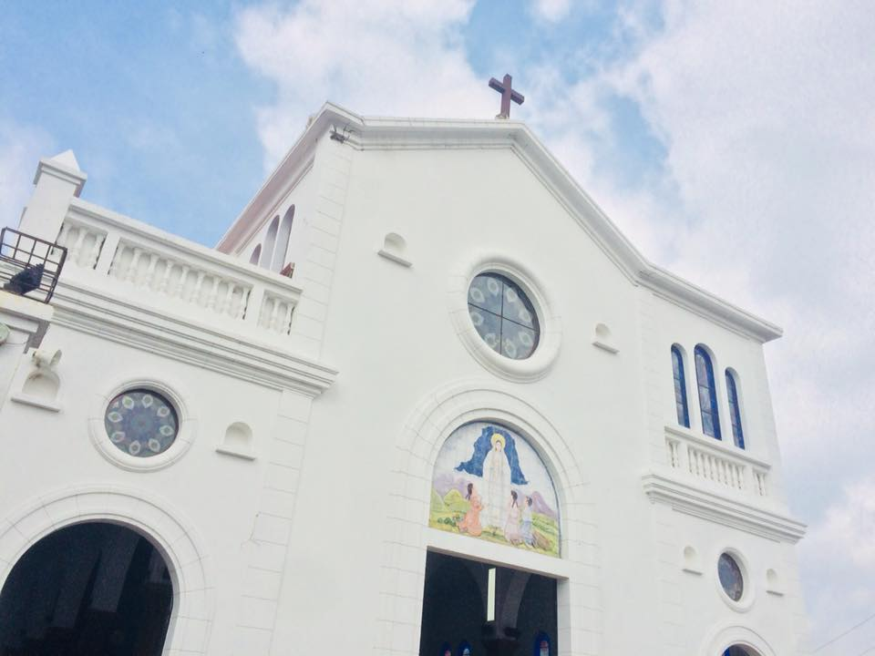 Fachada del Santuario de Nuestra Señora de Fatima, en Los Planes de Renderos